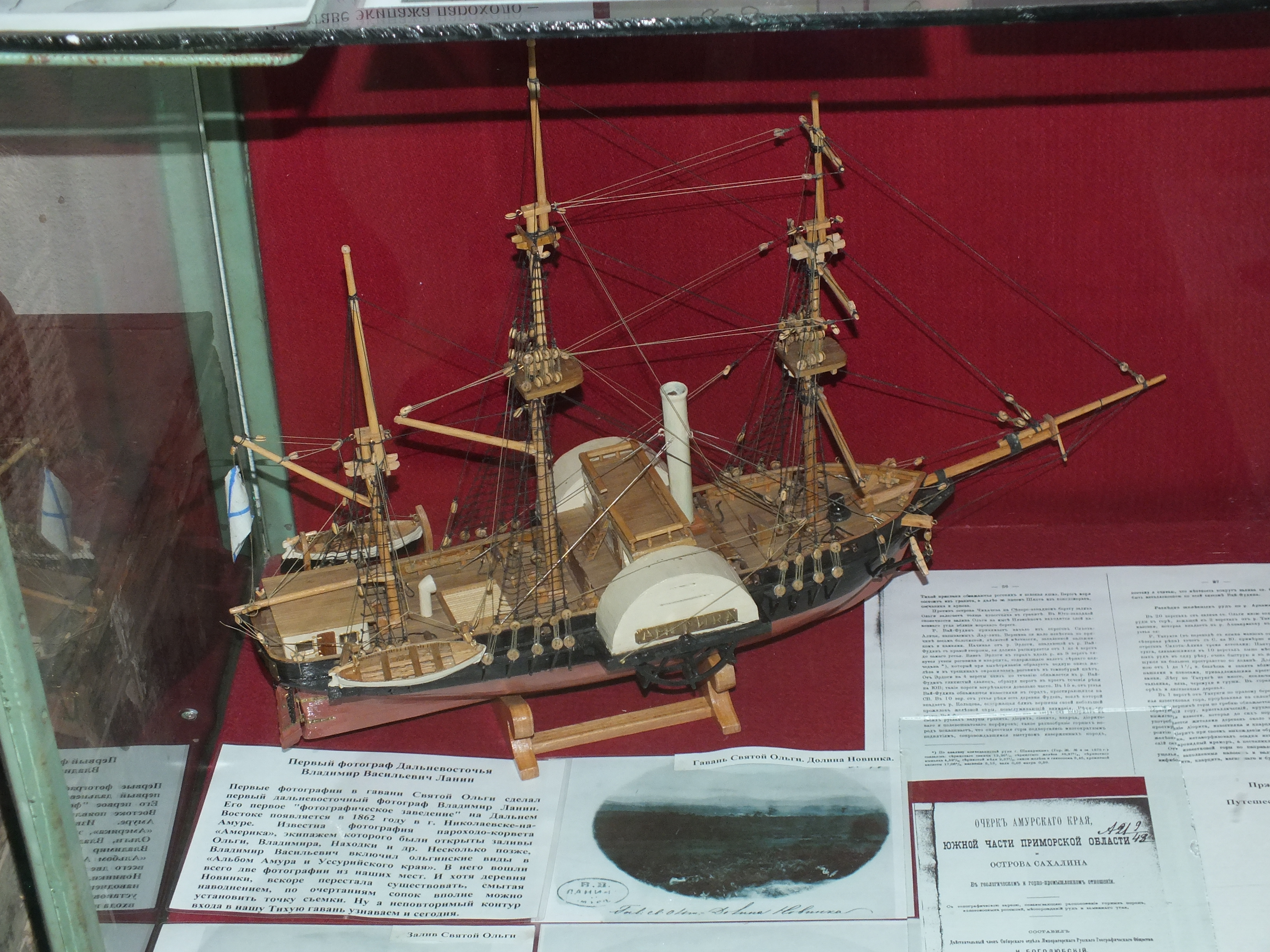 Olga, Primorsky krai